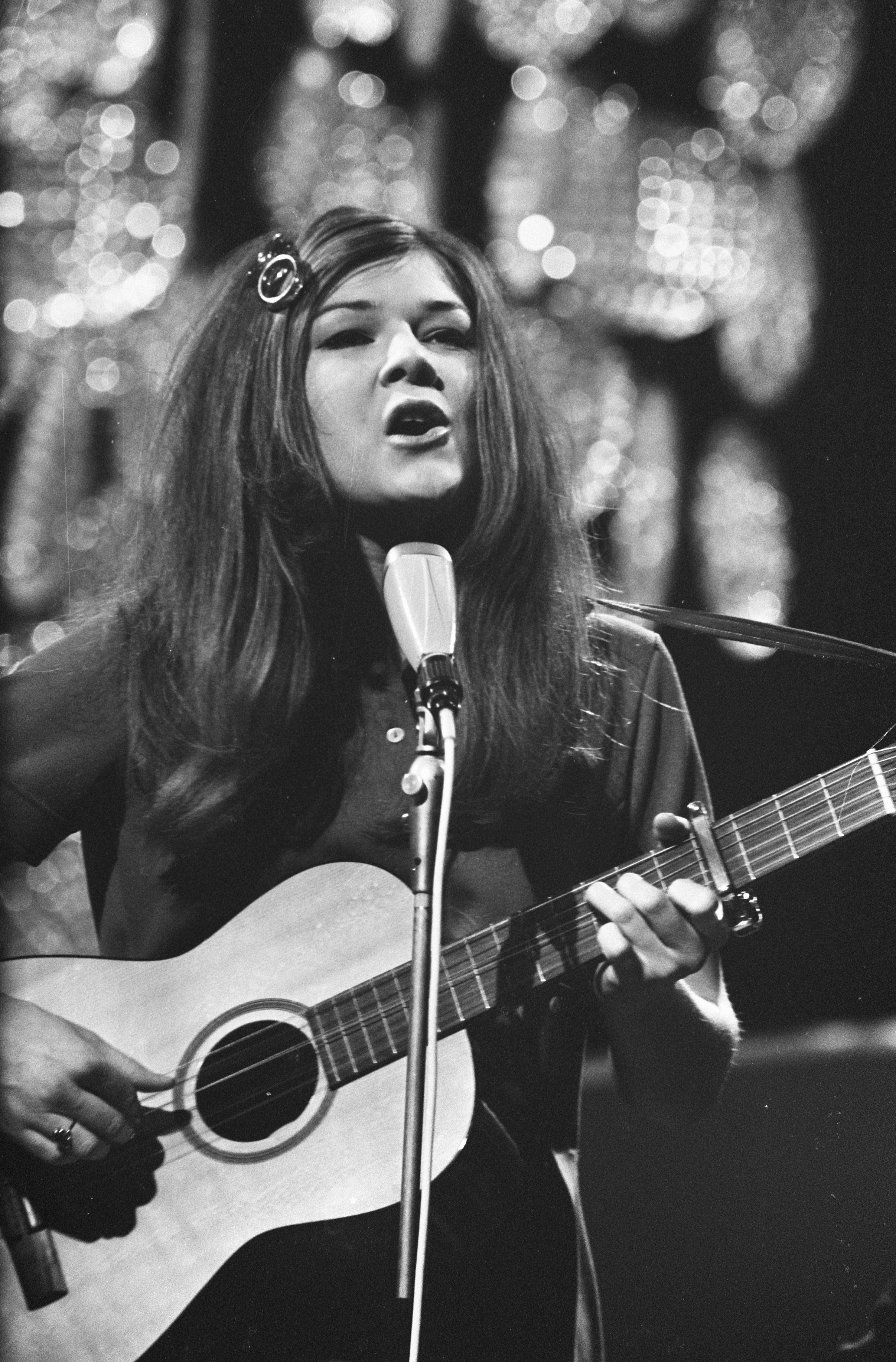 Collectie / Archief : Fotocollectie Anefo Reportage / Serie : Songfestival 1969 Beschrijving : Nationale finale van het Eurovisie Songfestival in Scheveningen, Lenny Kuhr zong het winnende liedje "Troubadour" Datum : 26 februari 1969 Locatie : Scheveningen, Zuid-Holland Trefwoorden : gitaren, muziek, songfestivals, zangeressen Persoonsnaam : Kuhr, Lenny Instellingsnaam : Nationaal Songfestival Fotograaf : Fotograaf Onbekend / Anefo Auteursrechthebbende : Nationaal Archief Materiaalsoort : Negatief (zwart/wit) Nummer archiefinventaris : bekijk toegang 2.24.01.05 Bestanddeelnummer : 922-1416